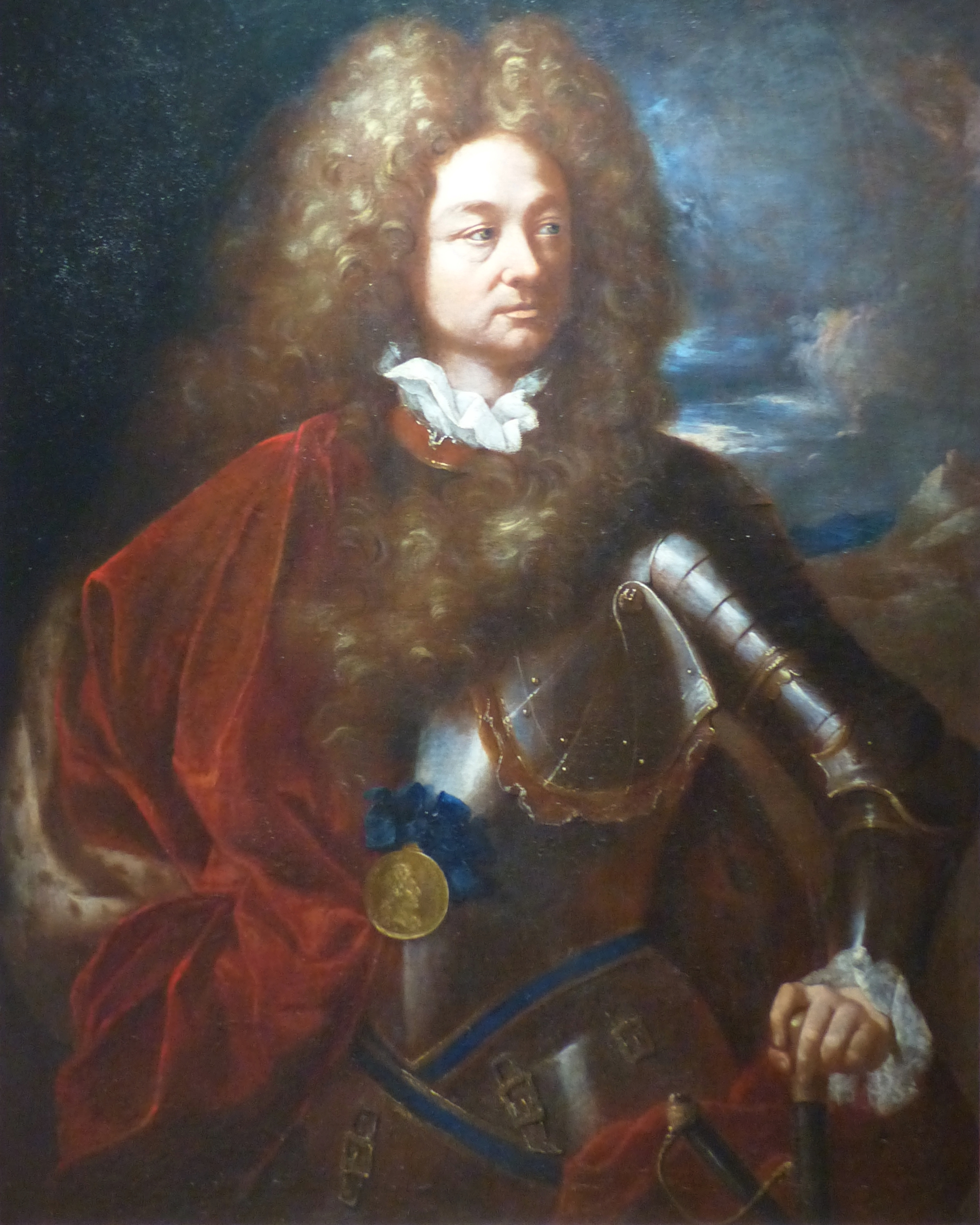 Perpignan (Pyrénées-Orientales, France), musée Hyacinthe Rigaud, collection peinture civile. Antoni Guerra le Jeune (1666-1711), fils ainé du peintre catalan Antoni Guerra le Vieux (1634-1705), ayant vécu et travaillé à Perpignan, obtint le titre de "peintre du roi Philippe V". Albert Manuel fut colonel du régiment de Berne au service du Roi de France et vainquit les troupes espagnoles lors de la bataille de Castellfolit de la Roca en 1695. Il fut nommé ensuite gouverneur militaire de la province du Roussillon.